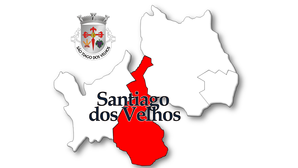 Evolução da População